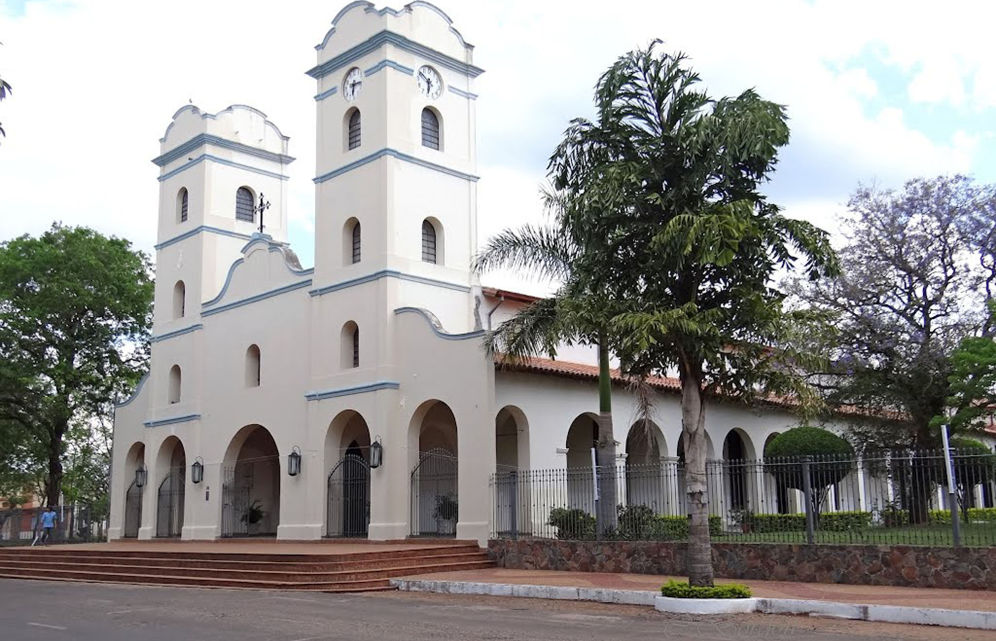 De acuerdo a los datos encontrados en la Diócesis de Carapeguá, la primera capilla fue construida por José de Miranda, en medio de una campiña. Fue entre los años 1700 y 1720.